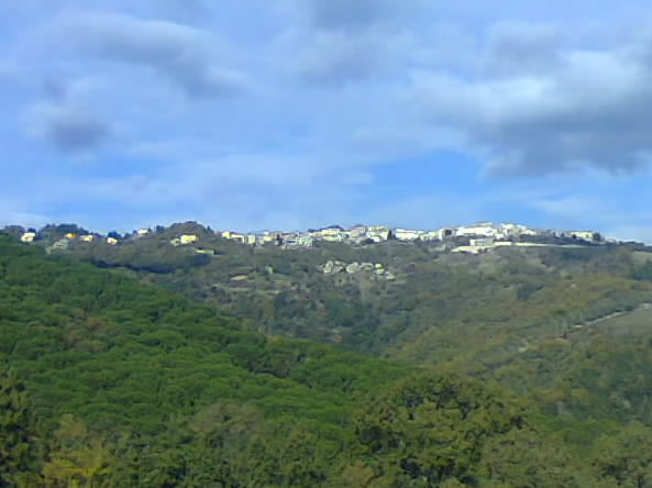 Castelsilano (KR)